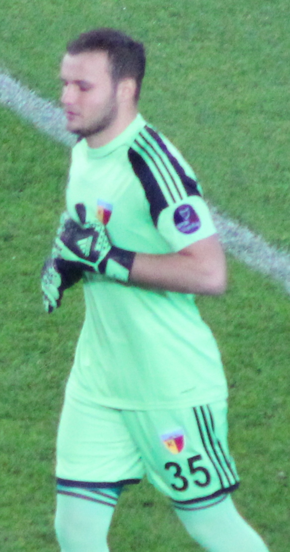 Gökhan Değirmenci